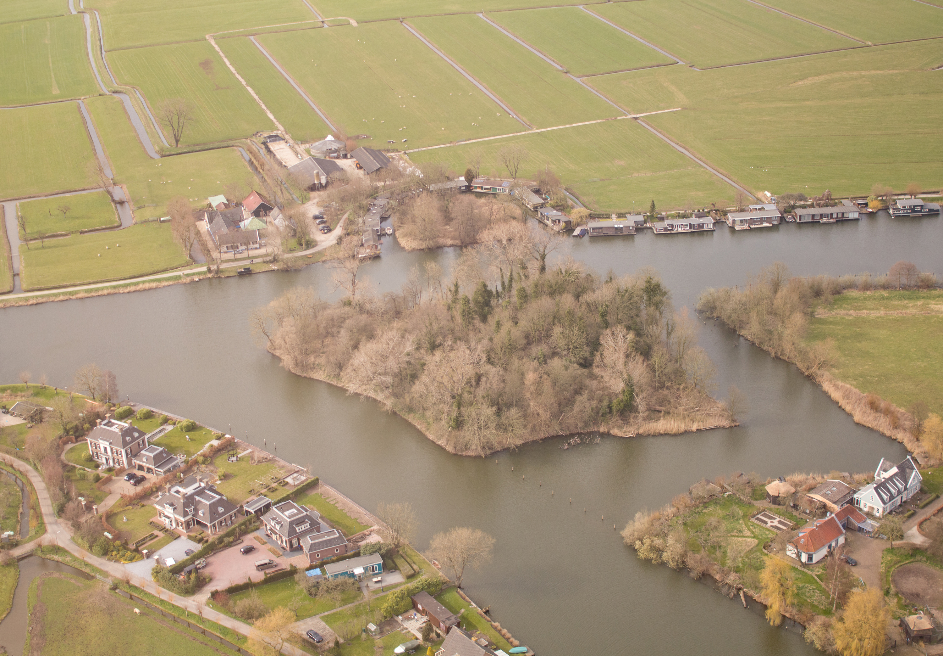 Fort bij Hinderdam (overmeerse Schans). Met dank aan Jeroen Komen.